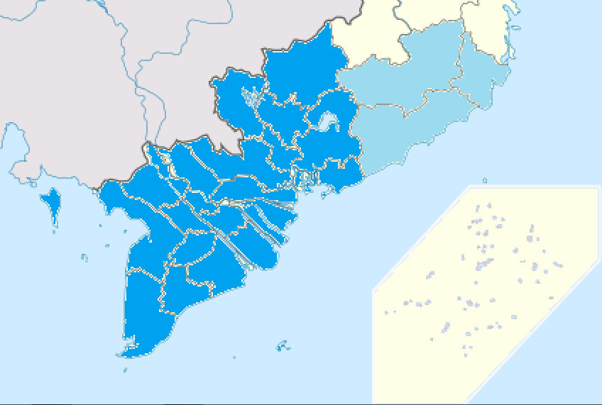 Bản đồ các tỉnh Nam Bộ.